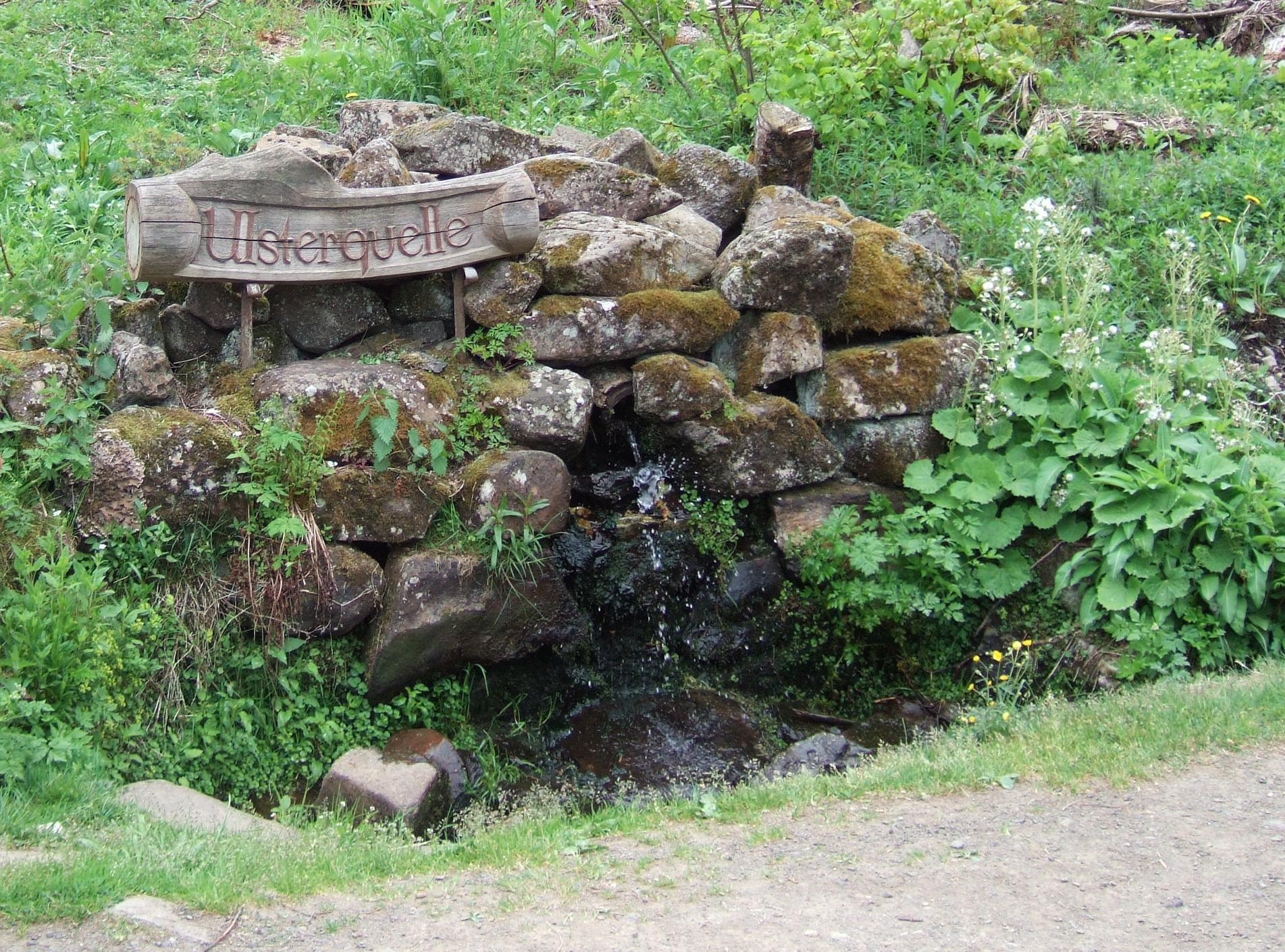 Die Ulsterquelle